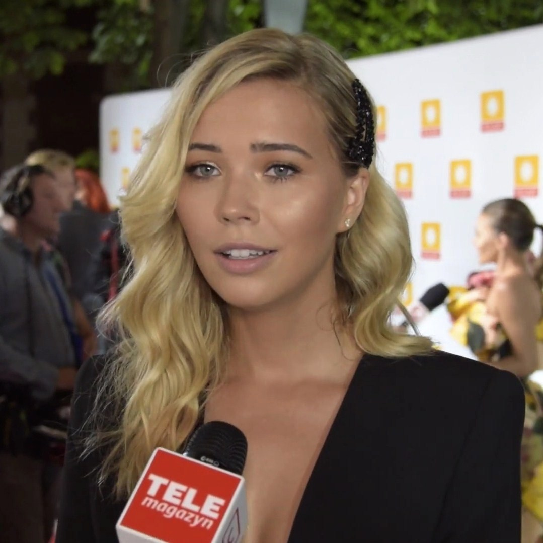 Sandra Kubicka, polska modelka.